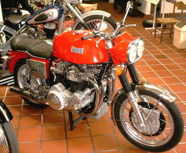 Münch mammut, eigenes Bild, GFDL